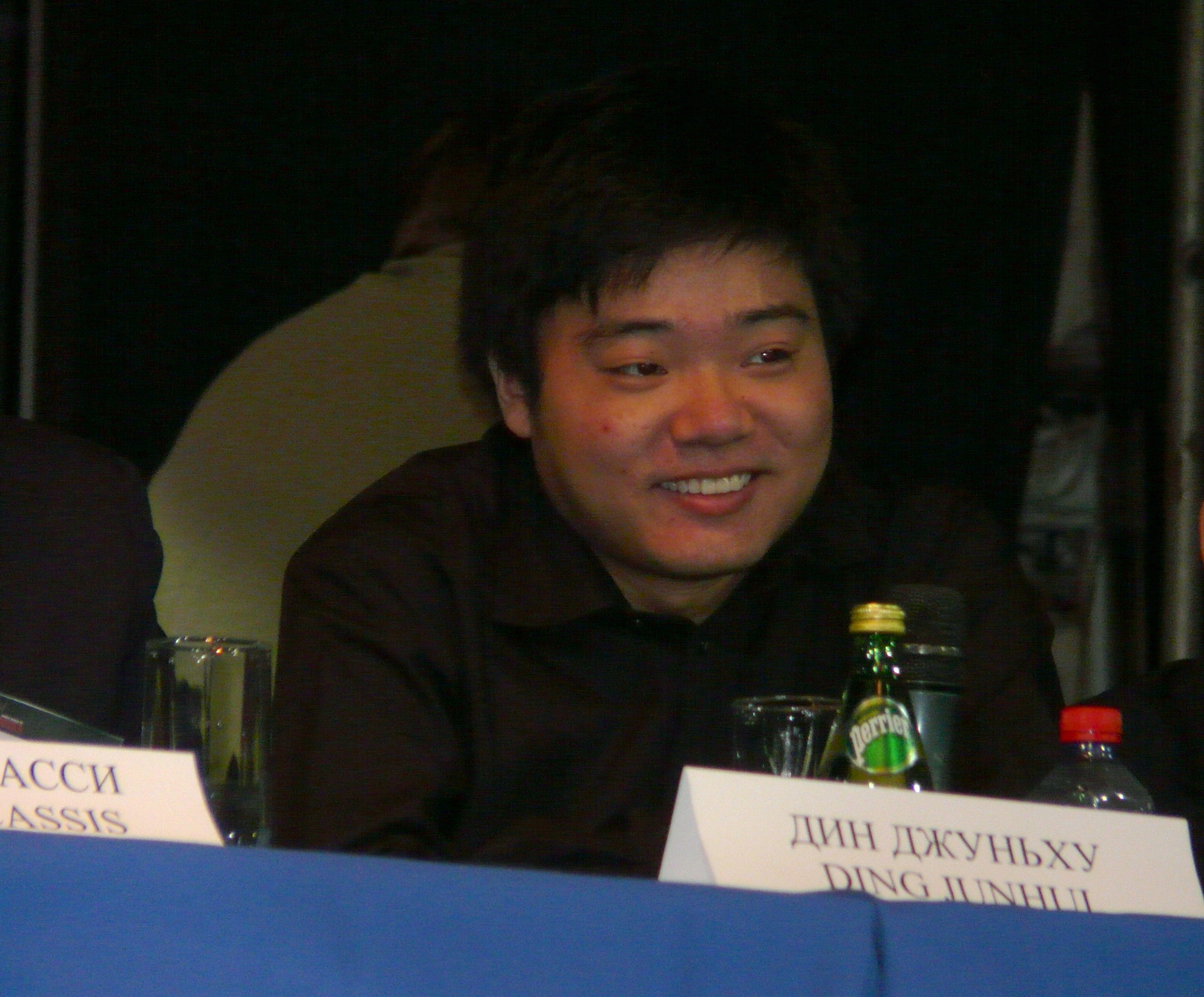 Туринир World Series of Snooker в Москве Динг Джуньху улыбается. Редкое фото!